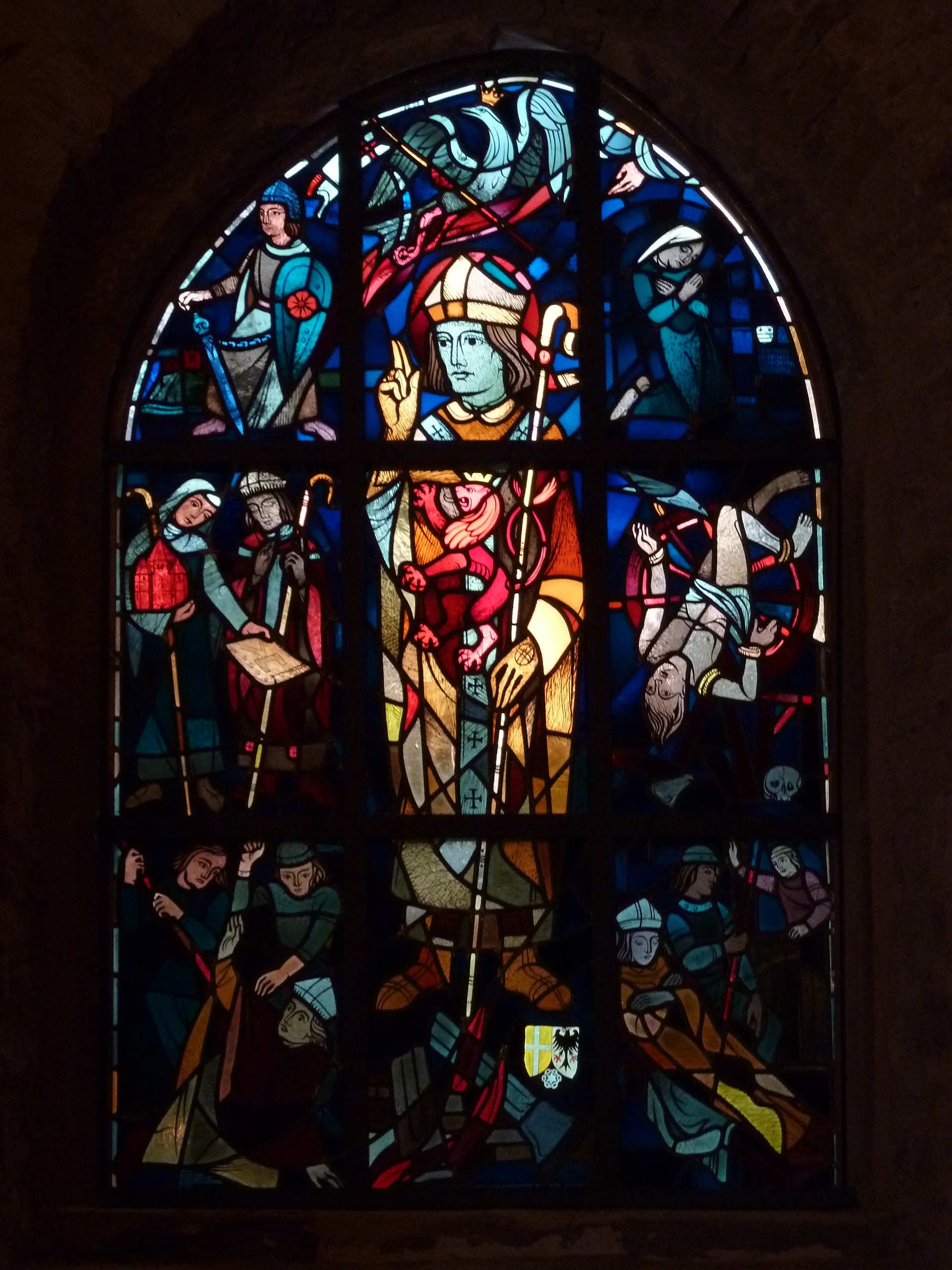 Klusenkapelle St. Ägidius Fenster mit der Geschichte von EngelbertThis is a photograph of an architectural monument., no. 63